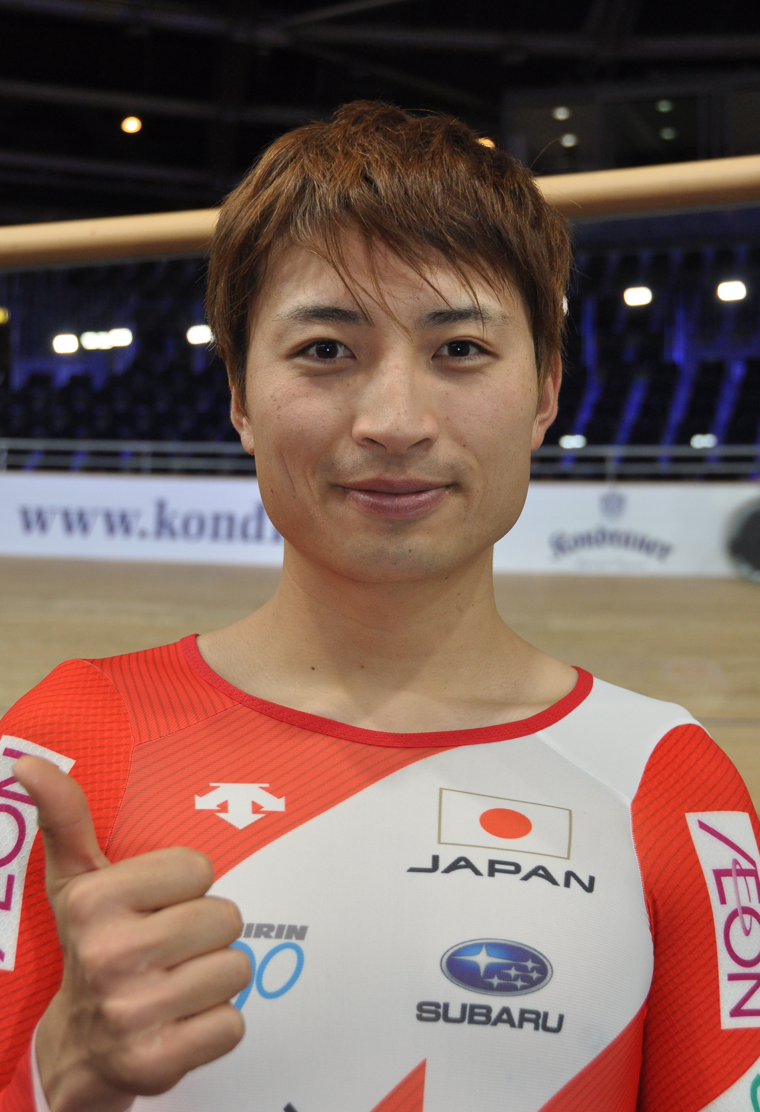 Eiya Hashimoto, Radsportler aus Japan